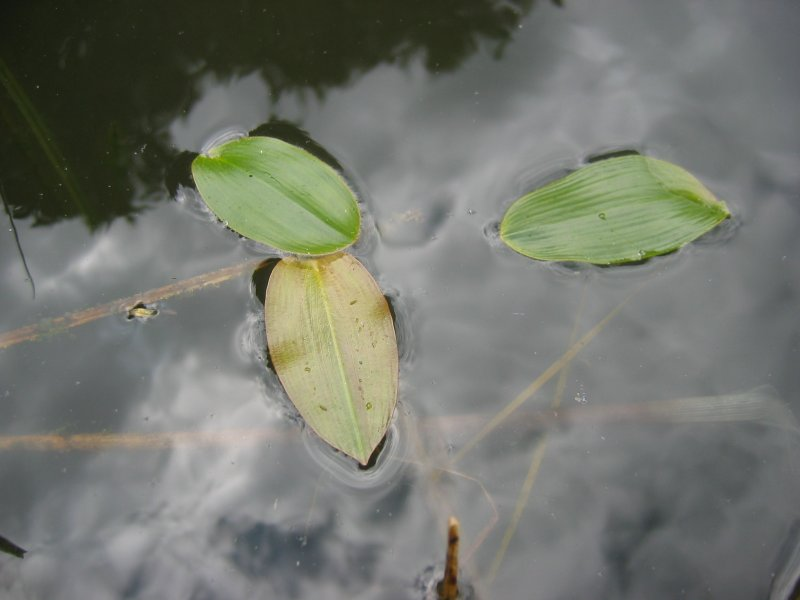 Schwimmendes Laichkraut Potamogeton natans, Müritz-Gebiet